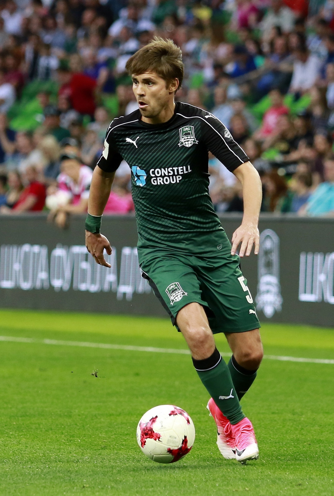 «Краснодар» - «Анжи»